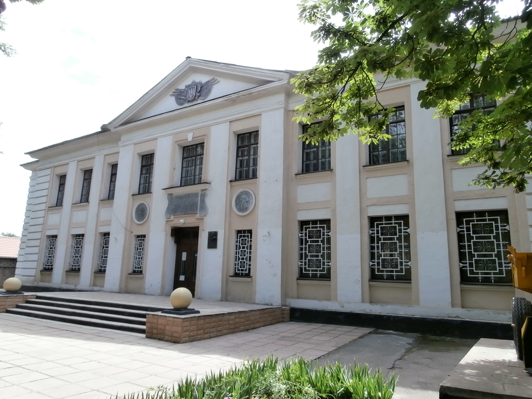 Schowti Wody Historisches Museum Vorderansicht